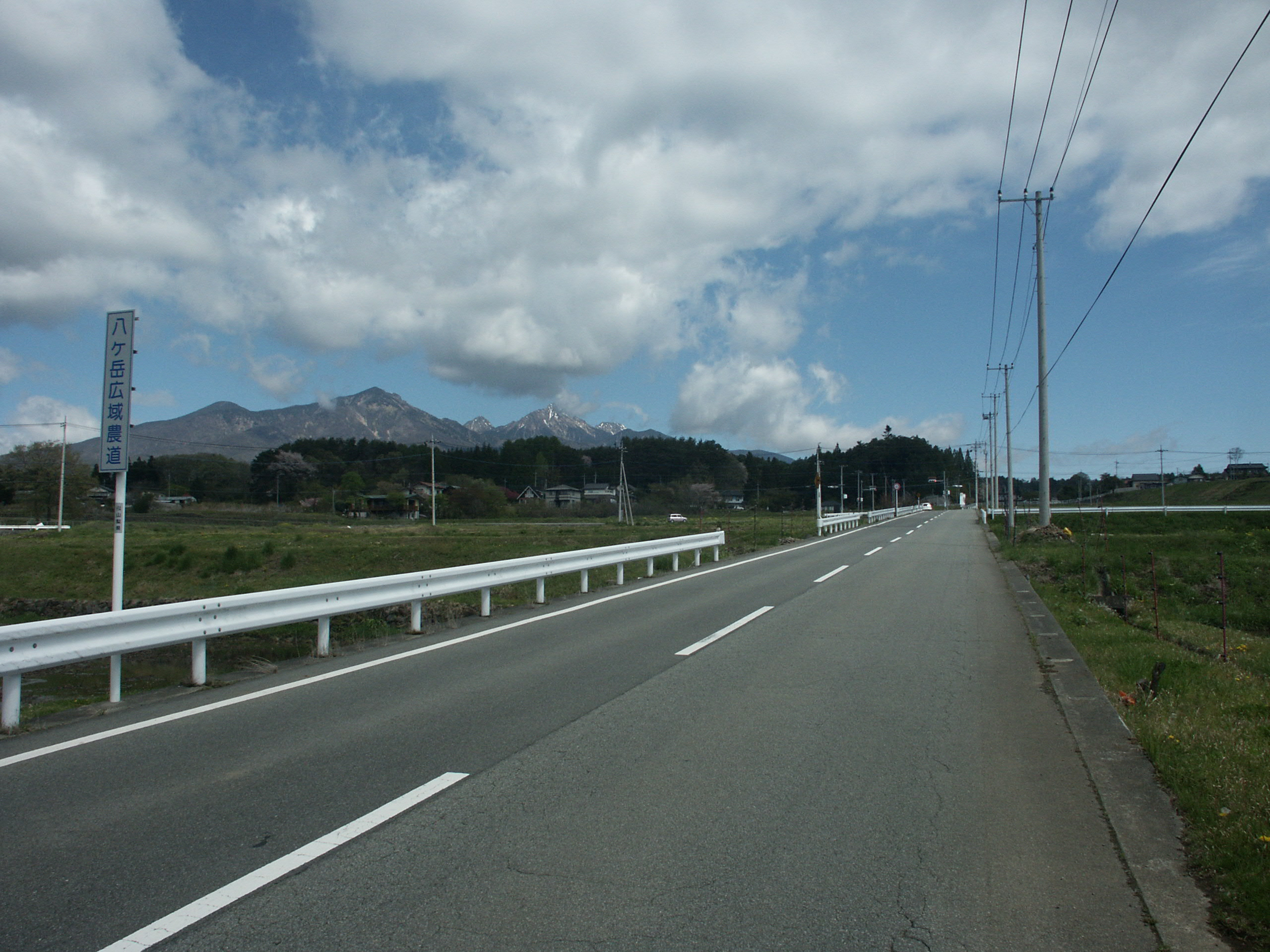 八ヶ岳広域農道北杜市高根町長澤付近（大泉方面を撮影）